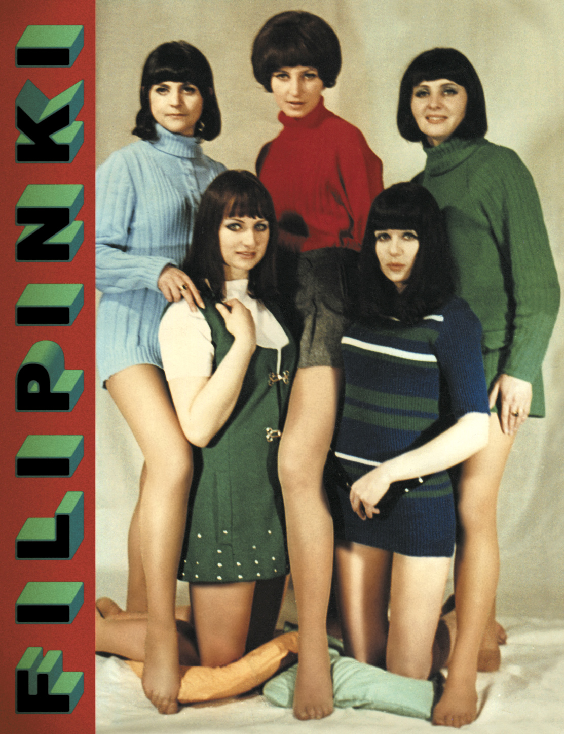 Plakat reklamujący koncerty Filipinek podczas trasy koncertowej „Nie wierz chłopcom”, pierwsza połowa 1970 r.